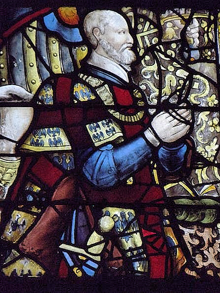 Anne de Montmorency (15 mars 1493-12 novembre 1567). Détail d'un vitrail (numero 1) de l'église Saint-Acceul d'Écouen (95).